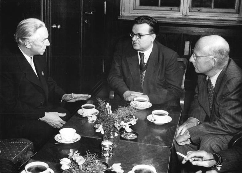 Zentralbild Quasch. 9.10.1954 Gäste aus der Sowjetunion beim Schriftstellerverband der DDR Der Schriftstellerverband der DDR, Berlin, konnte zwei bekannte Gäste aus der Sowjetunion in einer Aussprache begrüssen. UBz: Beim Schriftstellerverband der DDR von links nach rechts: der sowjetische Schriftsteller Professor Konstantin Fedin, der 1. Sekretär des Deutschen Schriftstellerverbandes, Gustav Just und der Schriftsteller F. C. Weiskopf.